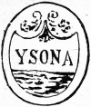 Escut antic d'Isona (Isona i Conca Dellà, Pallars Jussà)